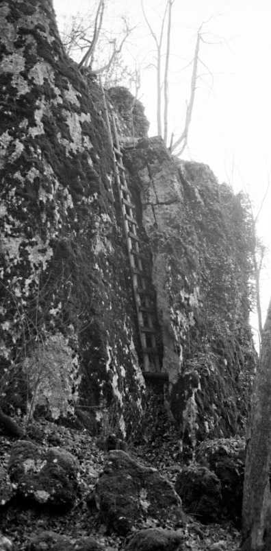 Provisorische Leiter zum Aufstieg auf die Ruine Hilzenstein